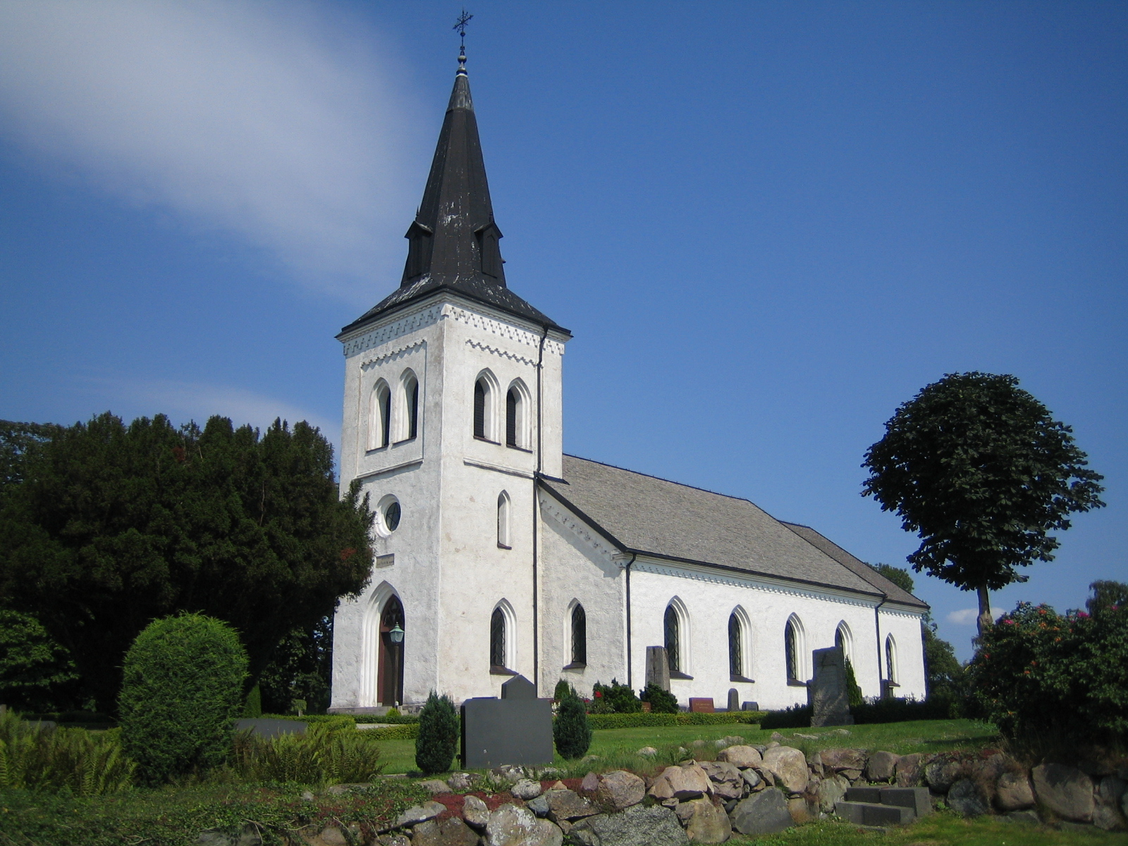 Lyngby kyrka. Bilden tagen av mig själv 20 augusti 2005.